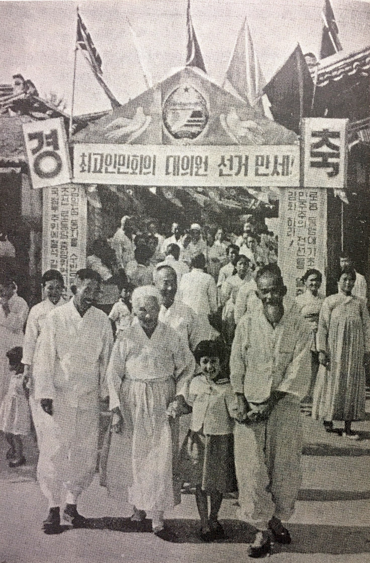 第一回最高人民会議代議員選挙